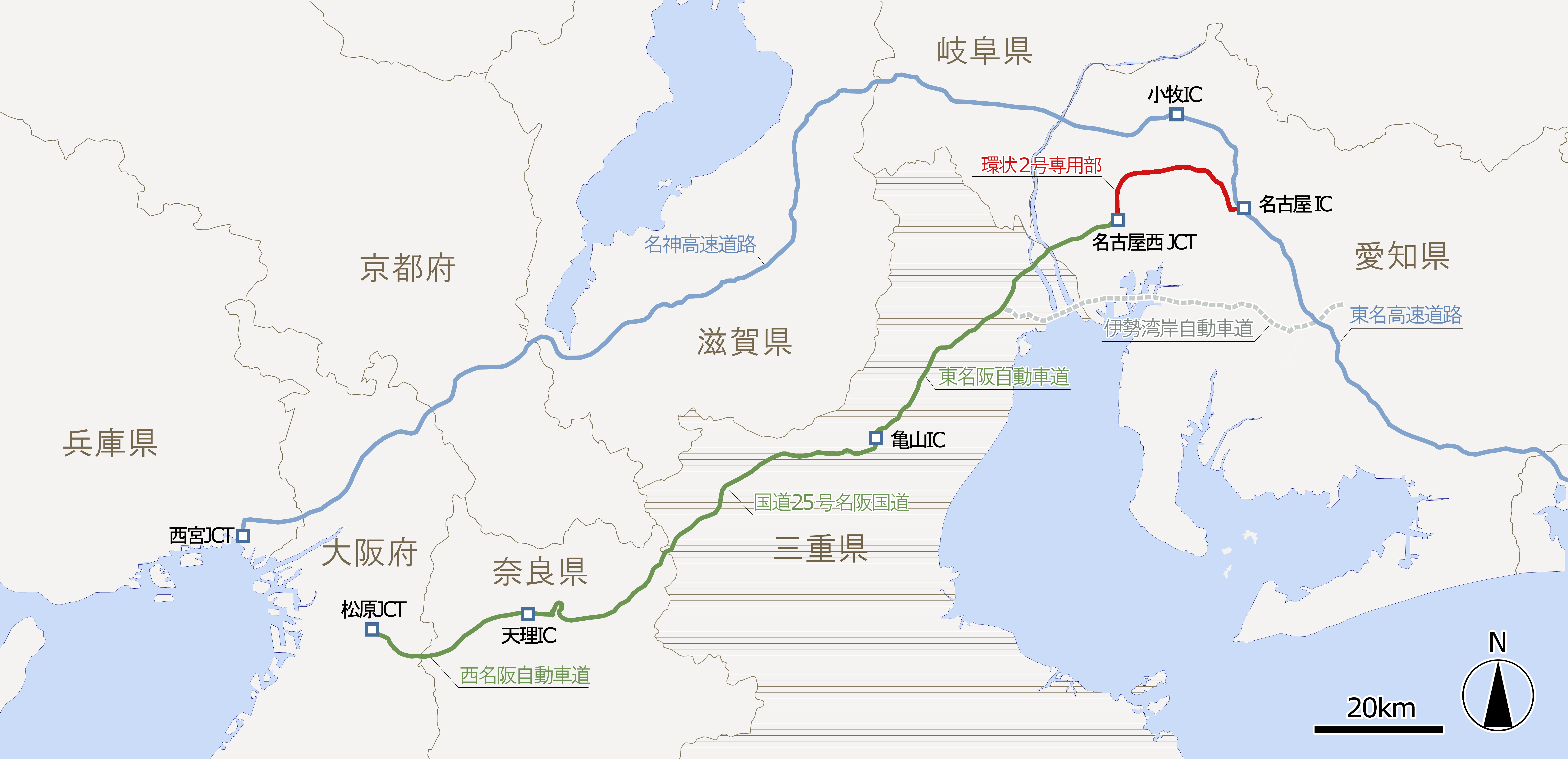 名古屋環状2号線専用部名古屋IC-名古屋西JCT間全通時点における名阪間路線図。